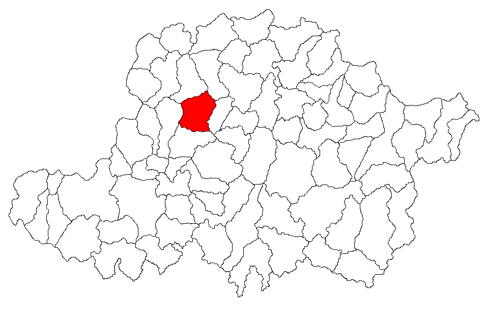 Categorie:Hărţi ale judeţului Arad